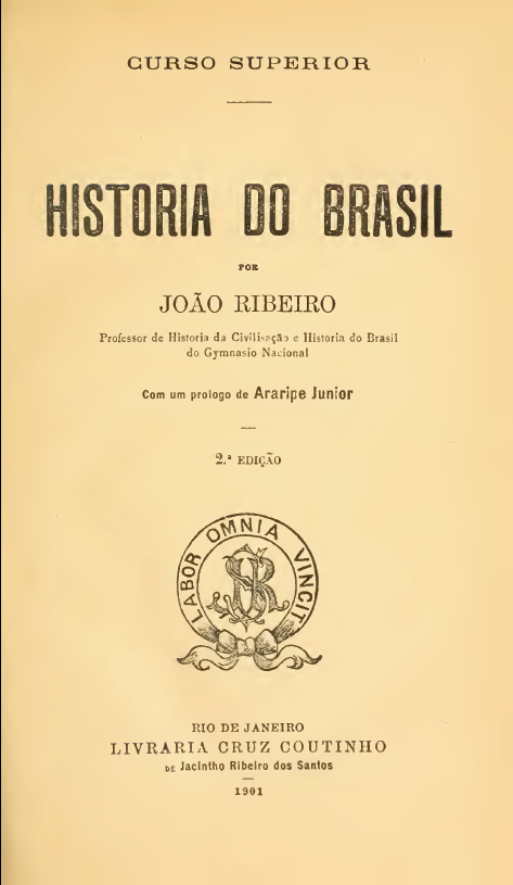 Frontispício da obra História do Brasil, de João Ribeiro (1864-1934).